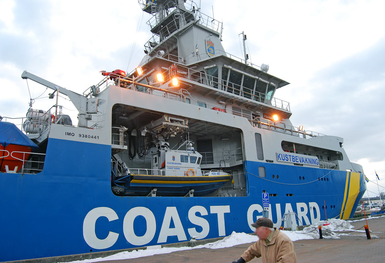 Detalj av KBV 001.